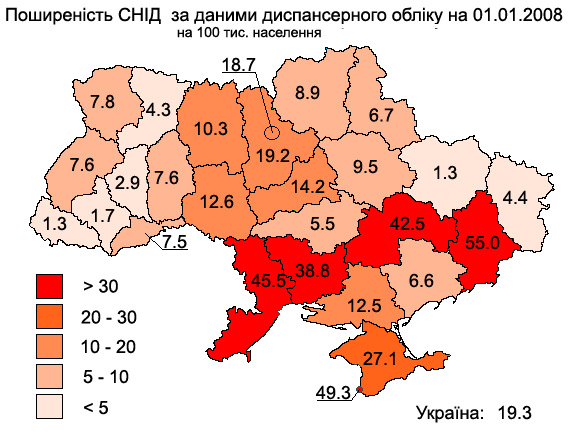 AIDS in Ukraine 2007: Поширеність СНІД в Україні у 2007 р.